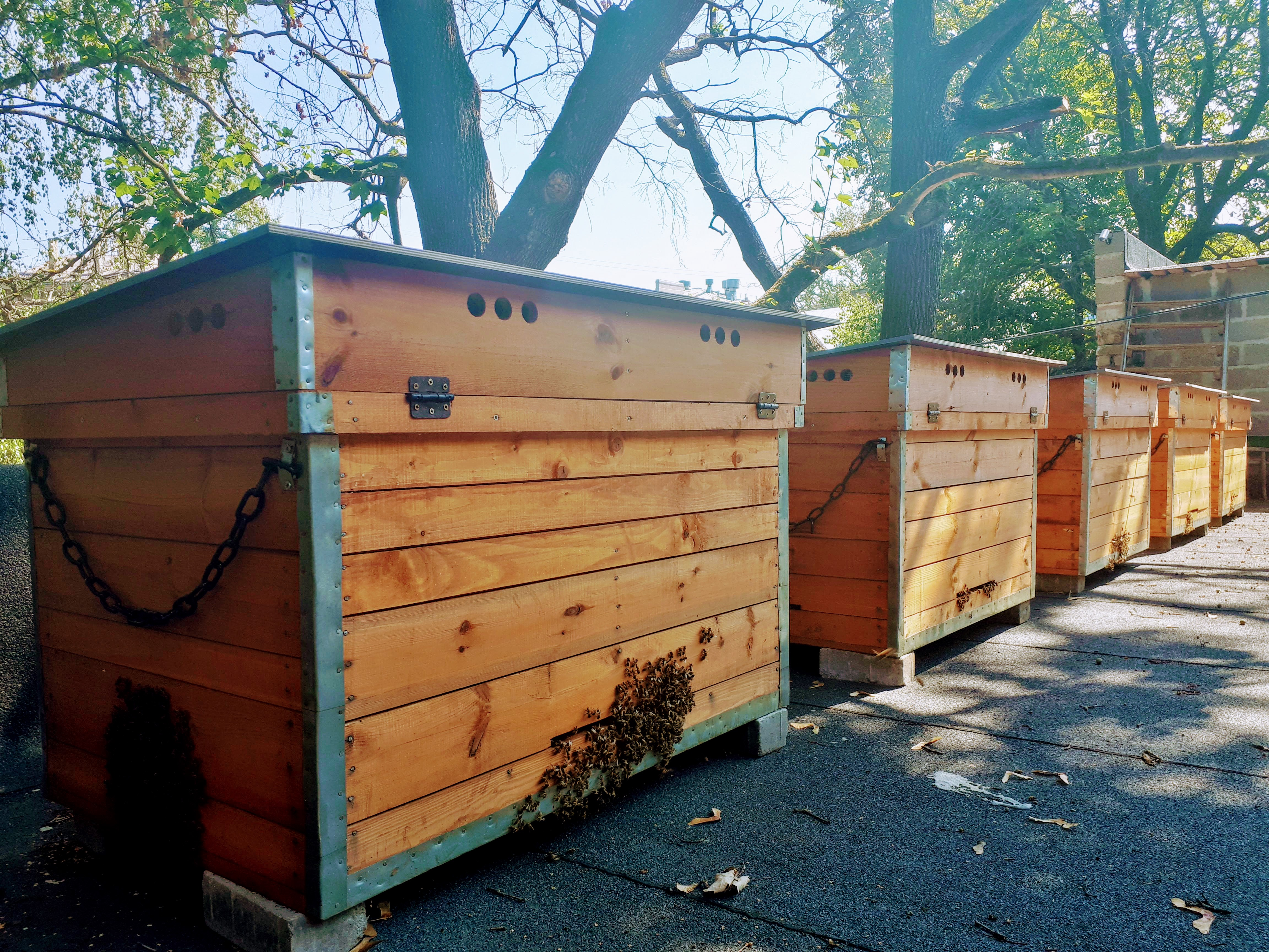 Hotel Janne uz jumta esošie bišu stropi, 2018. gada augusts